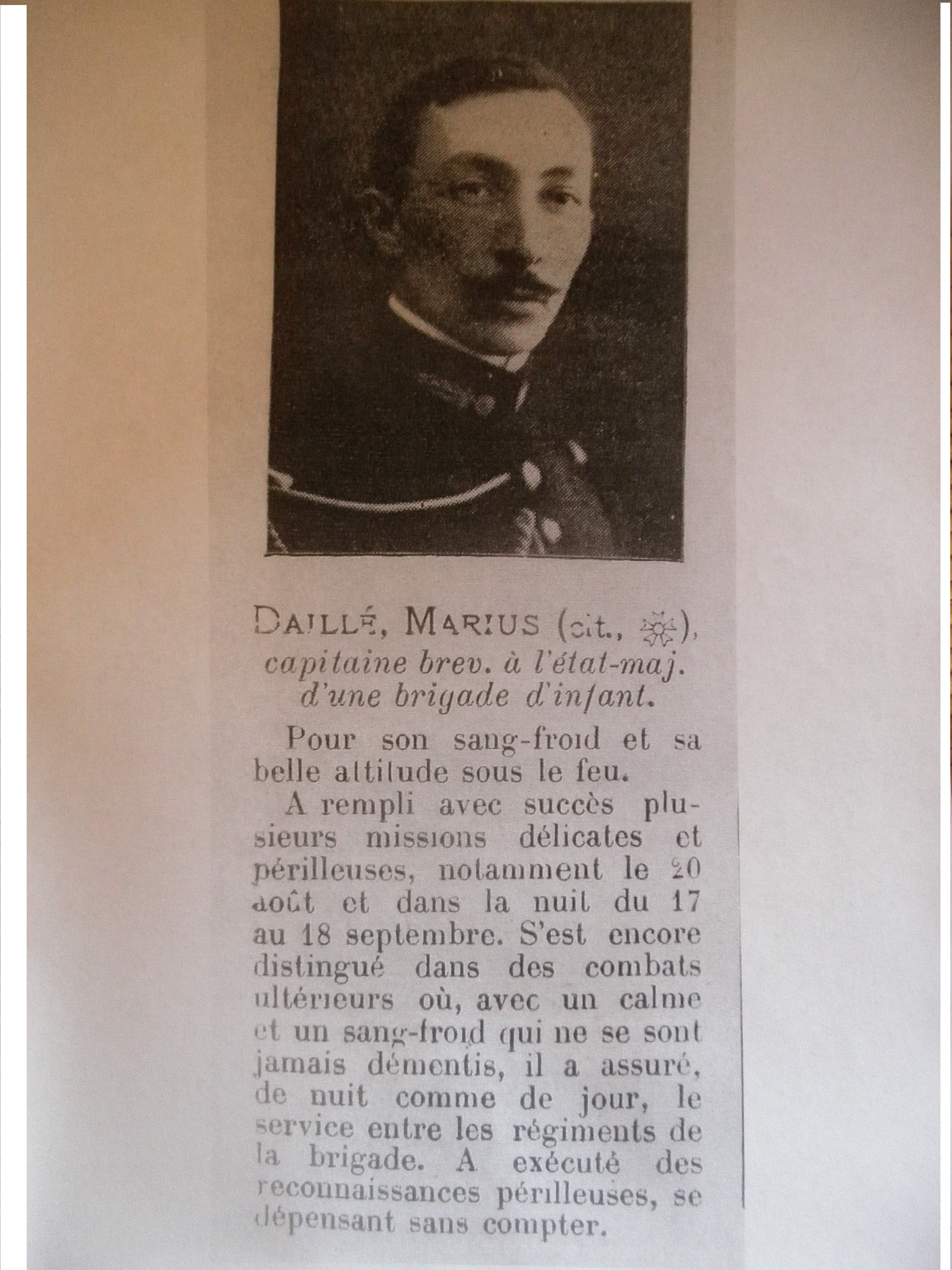 Citation militaire 1915